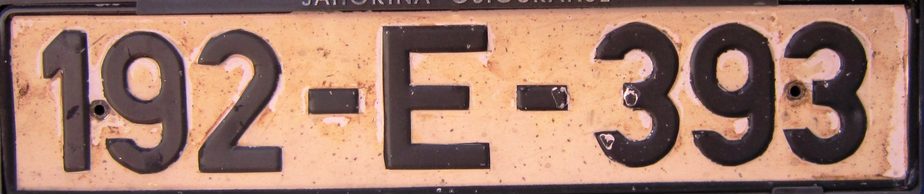 Bosnia and Herzegovina old license plate of Bus